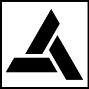 logoai